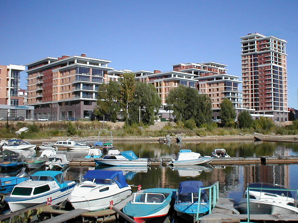 == Лицензирование ==